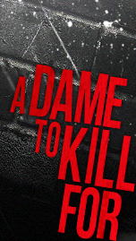 Logo de la película A Dame to Kill For, secuela de Sin City.